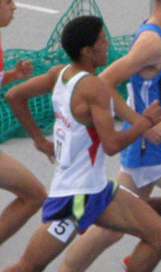 Mistrzostwa Świata Juniorów w Lekkoatletyce Bydgoszcz 2008 - finał 1500m M